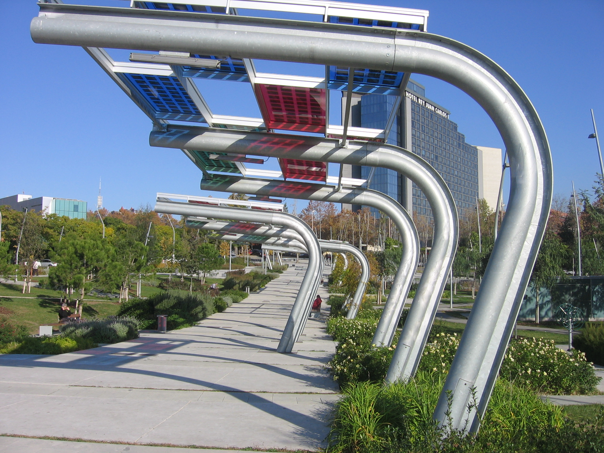 Parque de Can Rigal.